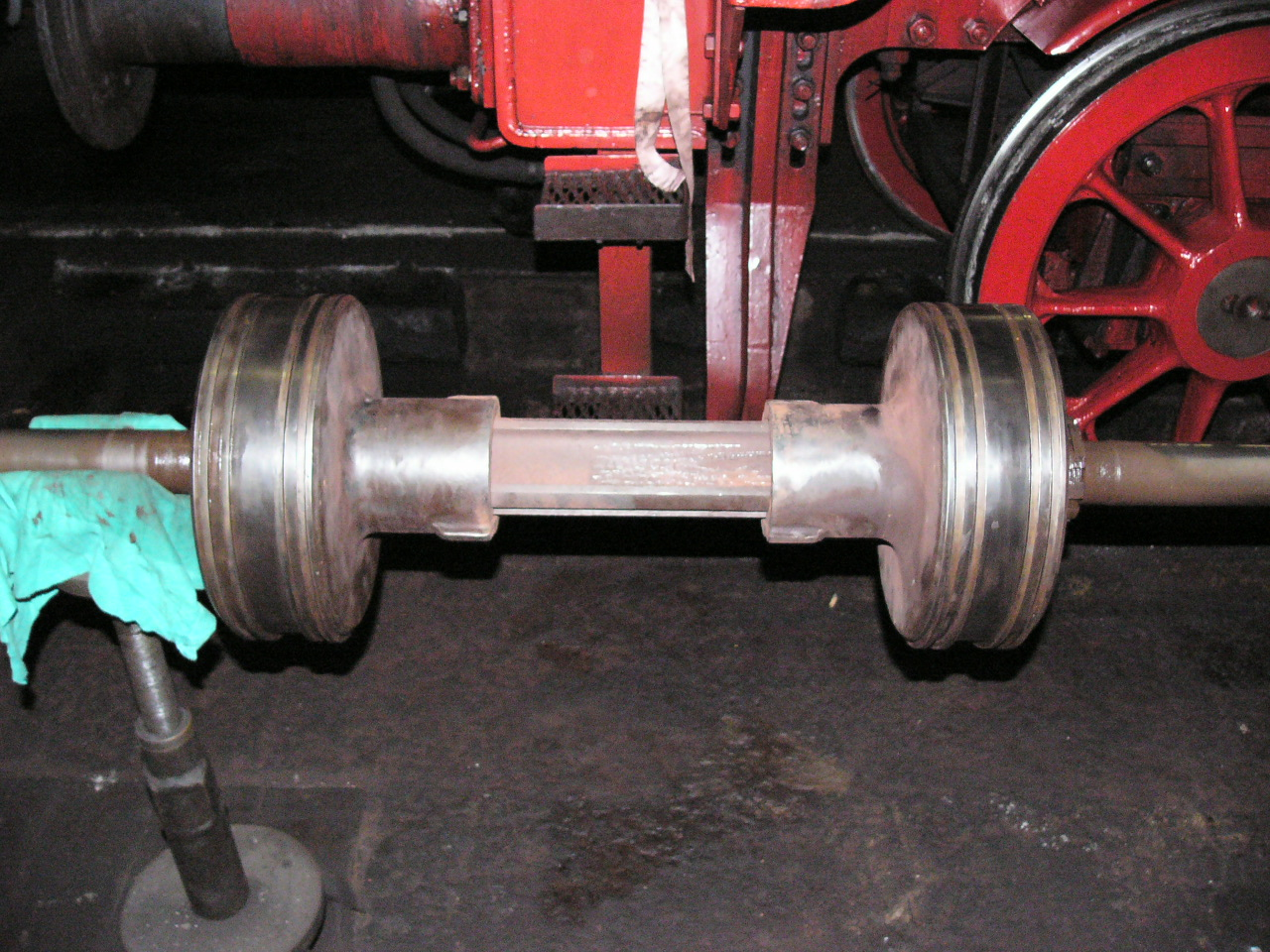 Trofimoff-Schieber der 41 1144-9 komplett, geschlossen